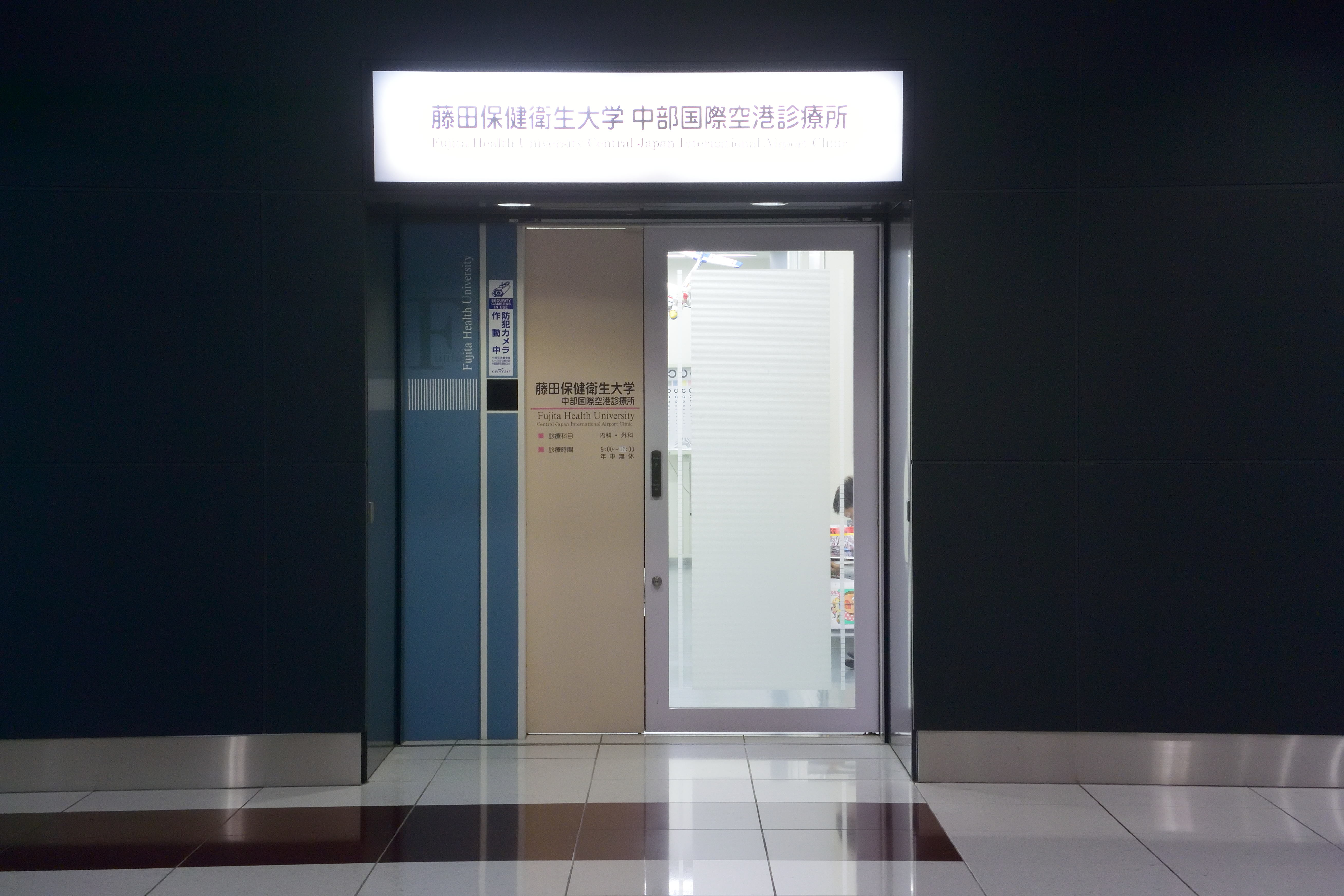 藤田保健衛生大学中部国際空港診療所